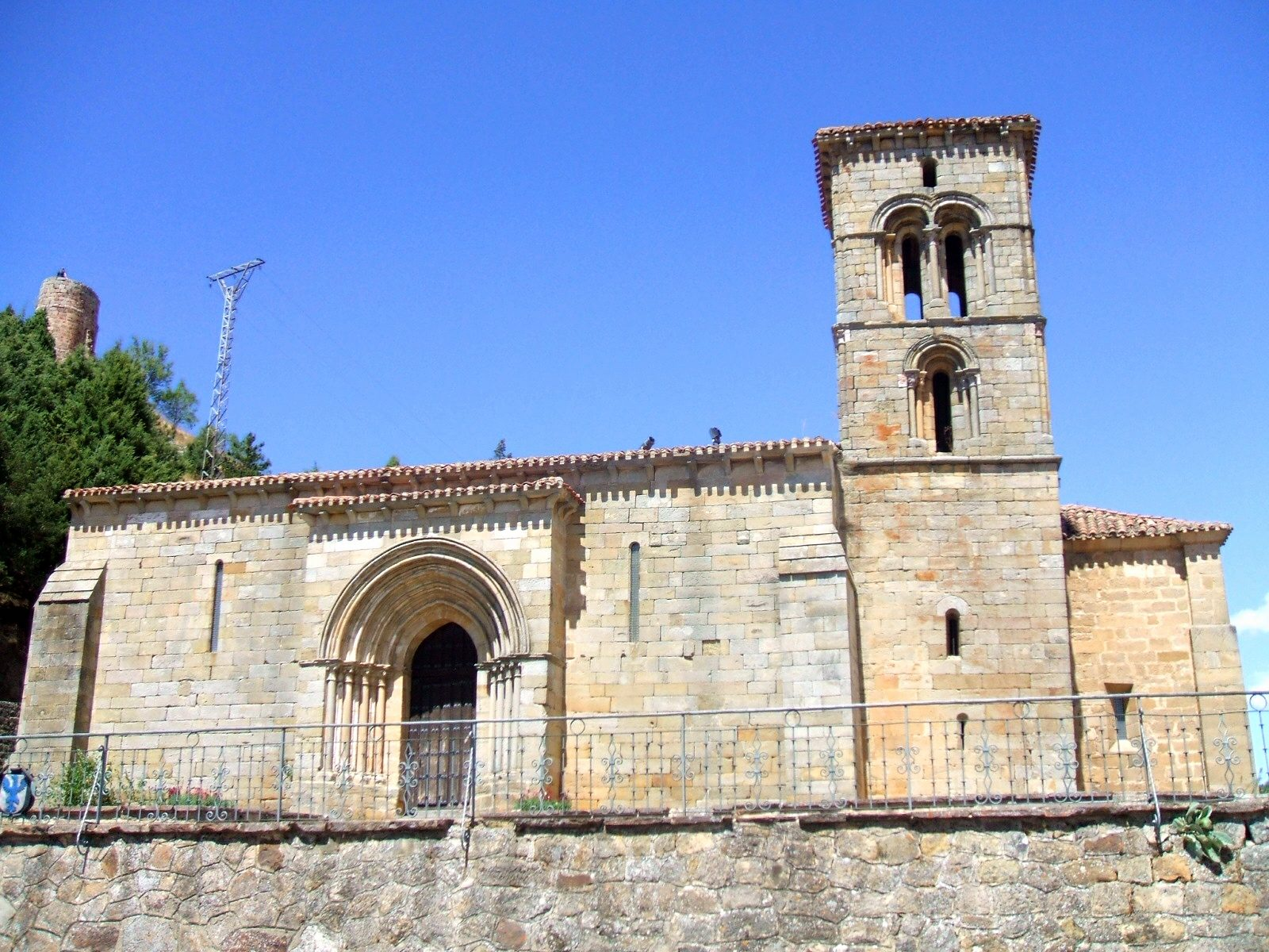 ermita de Santa Cecilia, en Aguilar de Campoo (Palencia, Castilla y León, España)